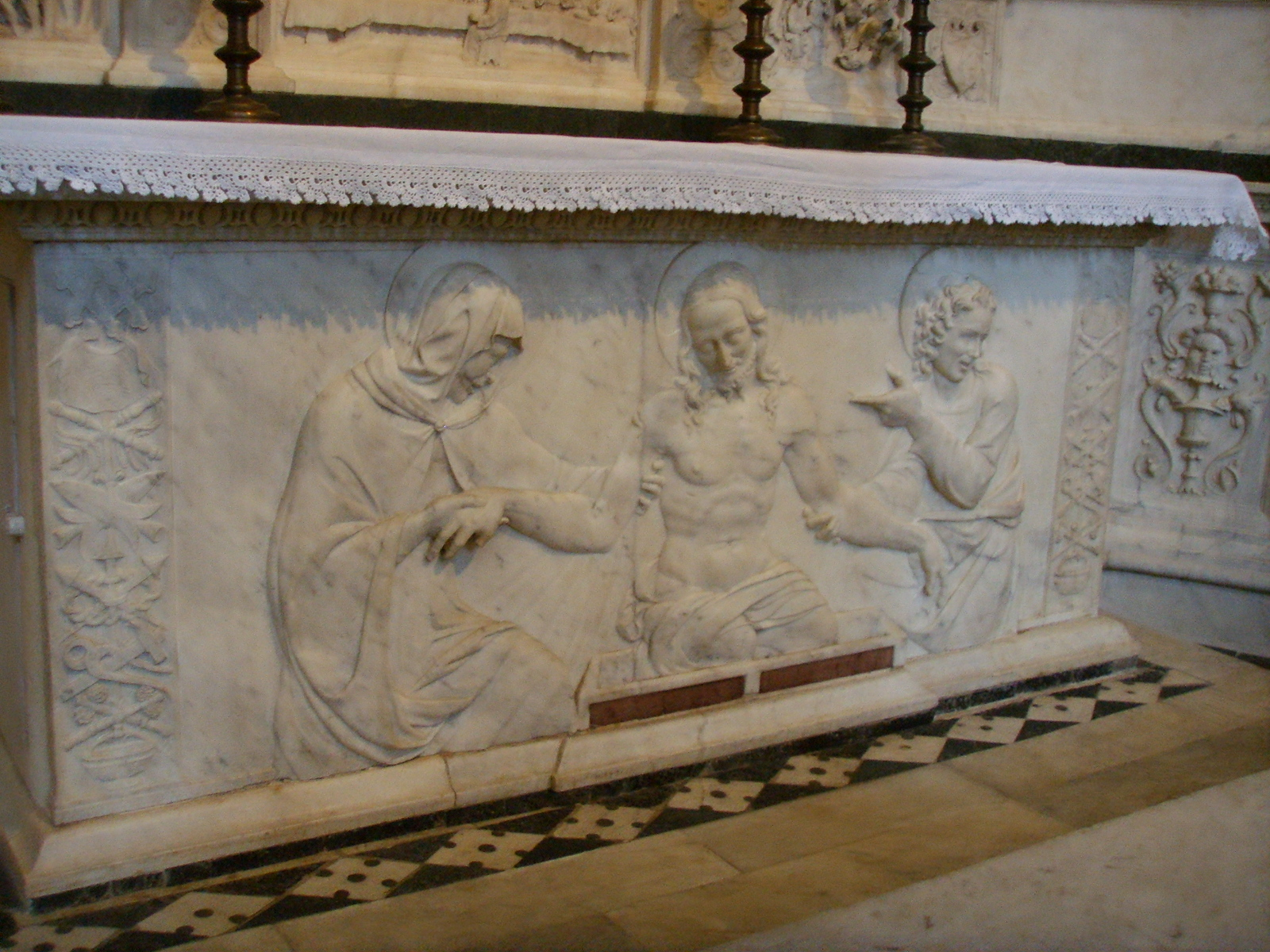 Santo Spirito, andrea sansovino, altare del sacramento, 1490 circa